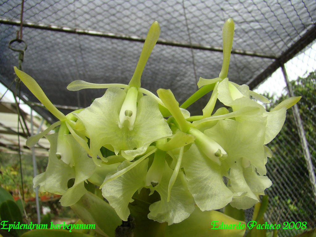 Epidendrum barbeyanum, an orchid